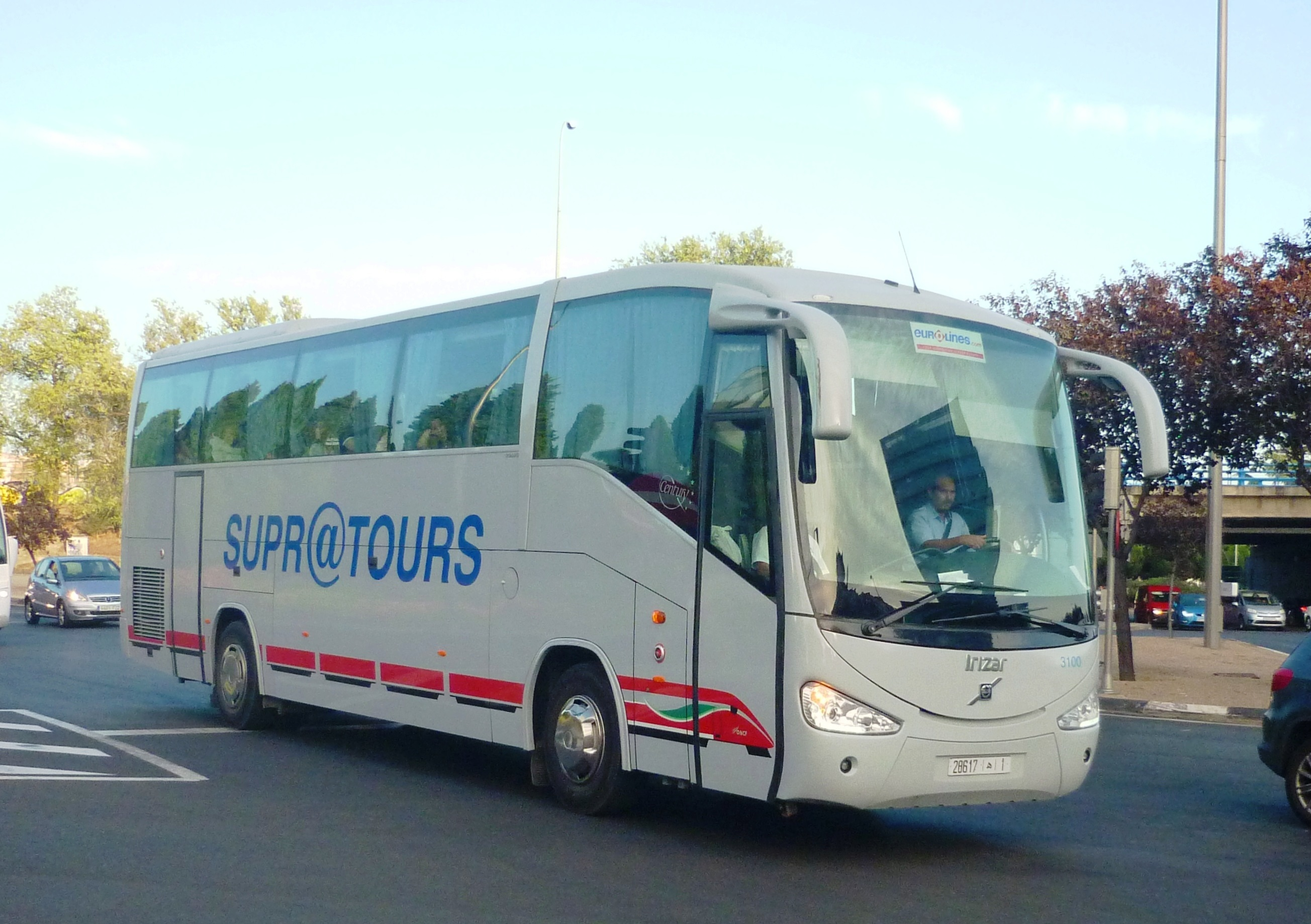 SupraTours(28617-1)